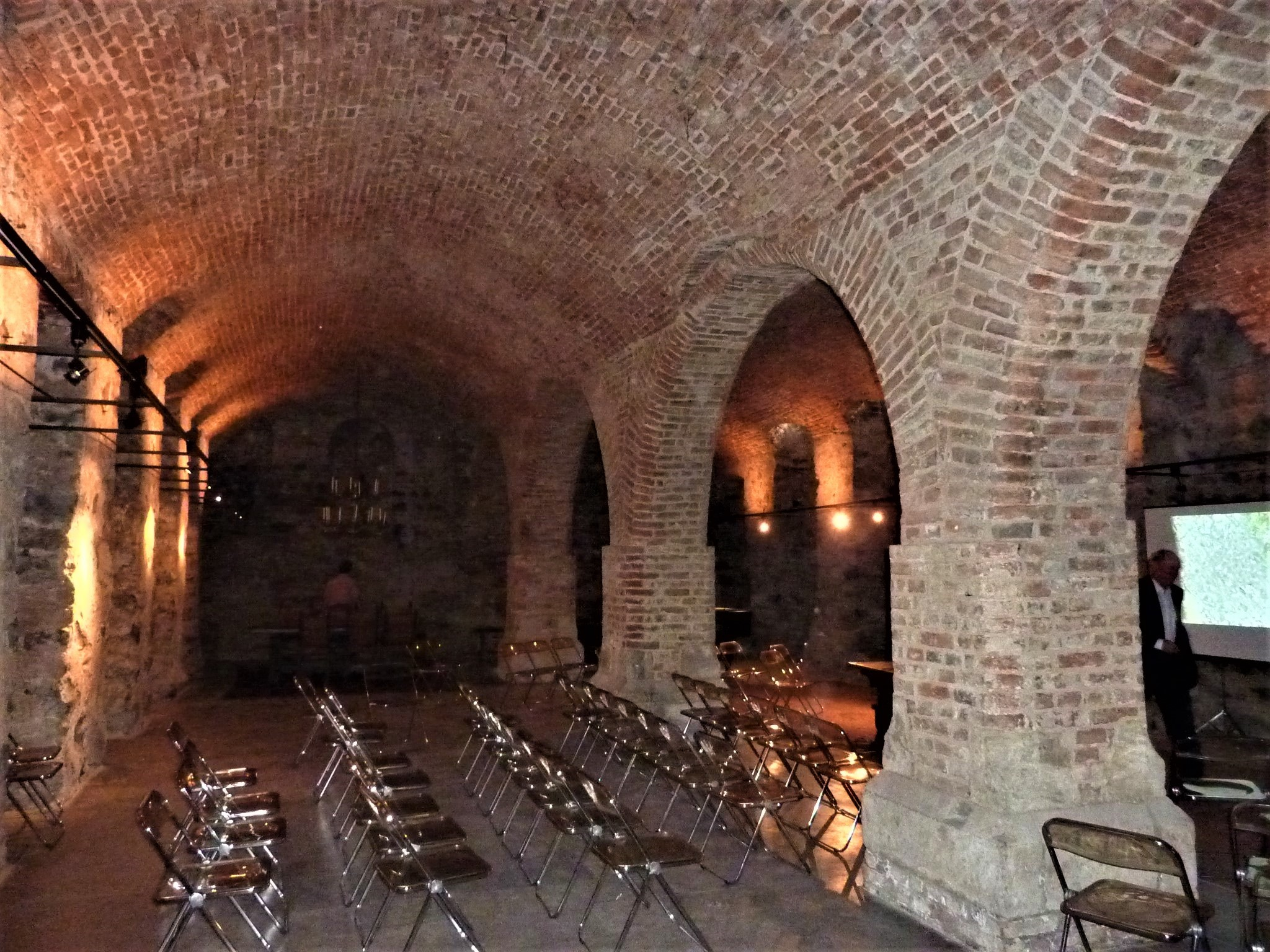 Am Römerturm 3 (Köln)